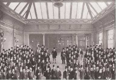 Изображение торгов на Лондонской бирже металлов в 1897 году